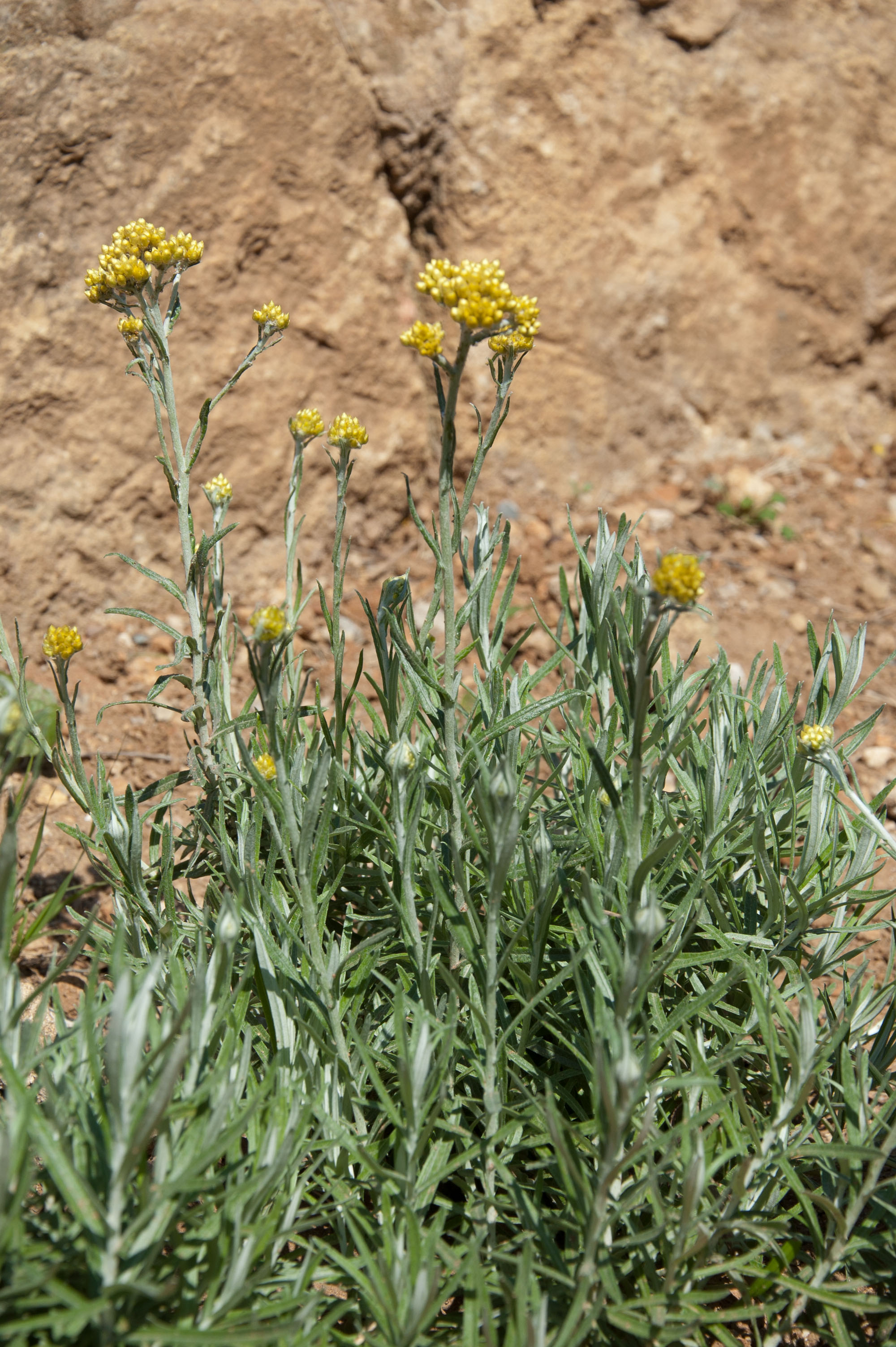 Helichrysum hyblaeum Brullo